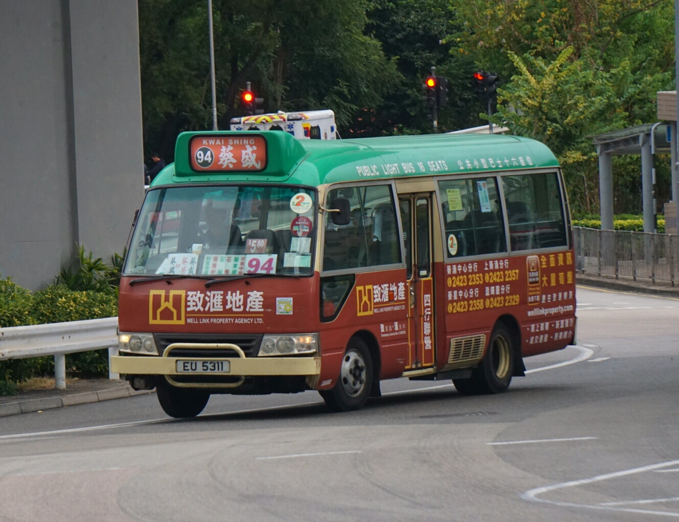 中文（香港）: 新界區專線小巴94線，正途經葵福路近貨櫃碼頭路交匯處